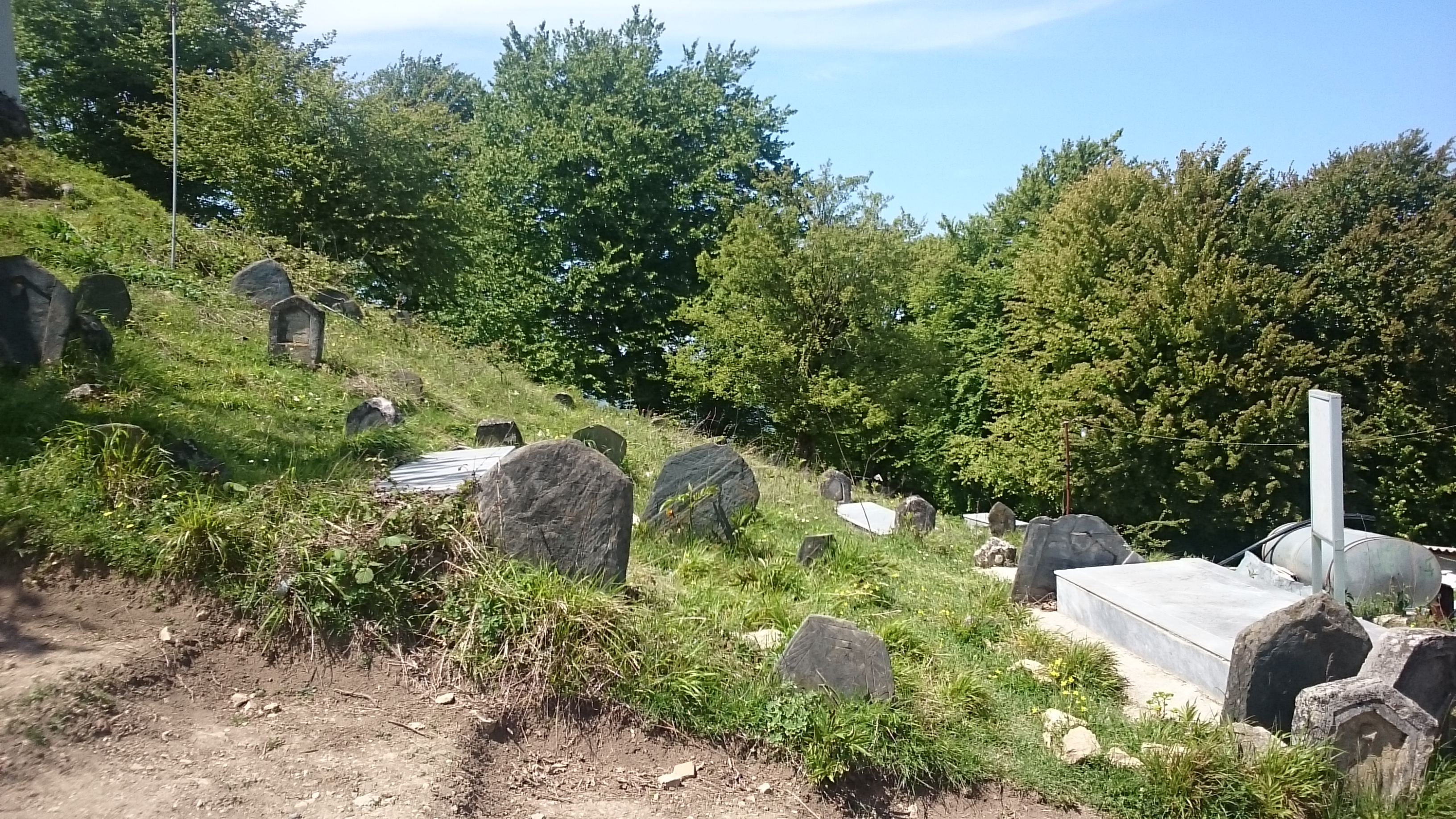 آرامگاه روستای زیارتکلای بخش هزارجریب شهرستان نکا